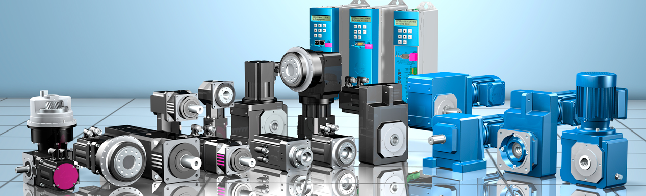 Productrange STOEBER ANTRIEBSTECHNIK